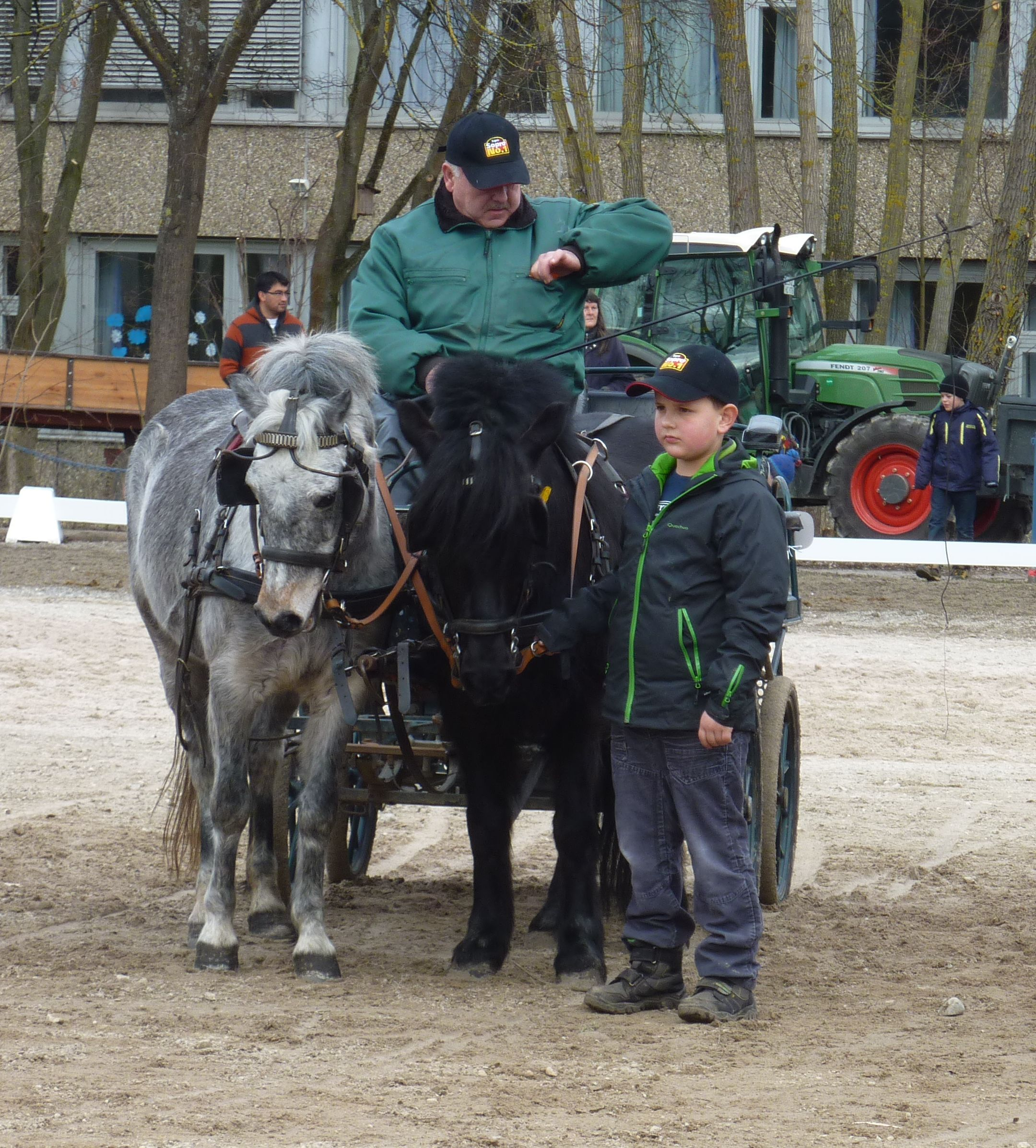 Pferdemarkt Bernhausen 2014